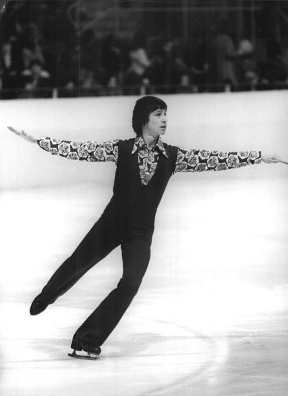 Jan Hoffmann ADN-ZB Mittelstädt 12.11.75 Karl-Marx-Stadt: Ex-Weltmeister wieder dabei. Nach einjähiger Wettkampfpause wegen Verletzung, stellt sich Ex-Weltmeister Jan Hoffmann (SC Karl-Marx-Stadt - Foto vom Vorjahr) bei den internationalen Eiskunstlauf-Wettbewerben um den Pokal der Blauen Schwerter dem einheimischen Publikum wieder vor. Nach der Pflicht am 12.11.75 führt er die Herren-Konkurrenz mit Platzziffer 7,0 und 34,60 Punkten an.